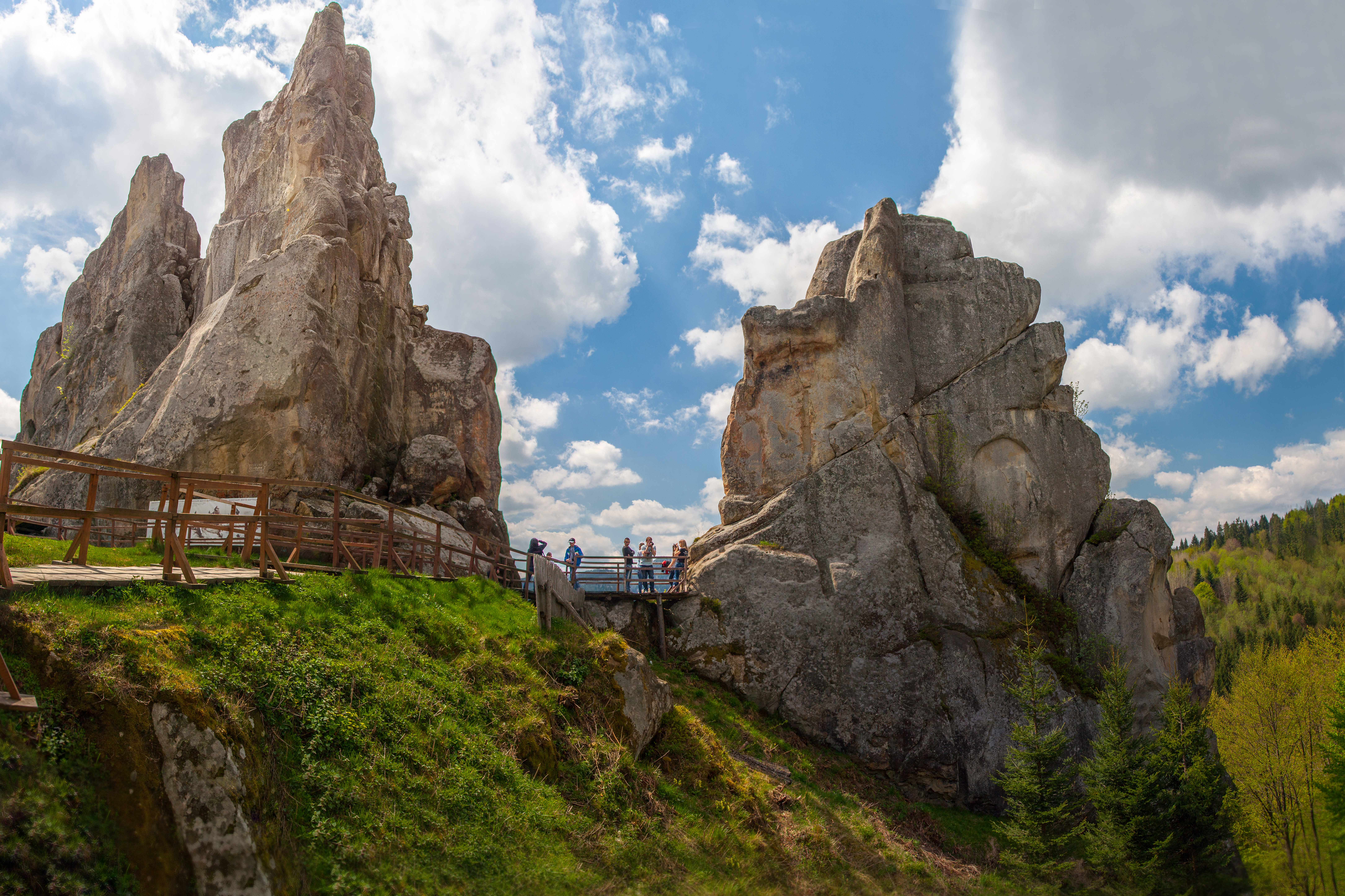 Городище літописного міста Тустаня, с. Урич, на північний захід від села